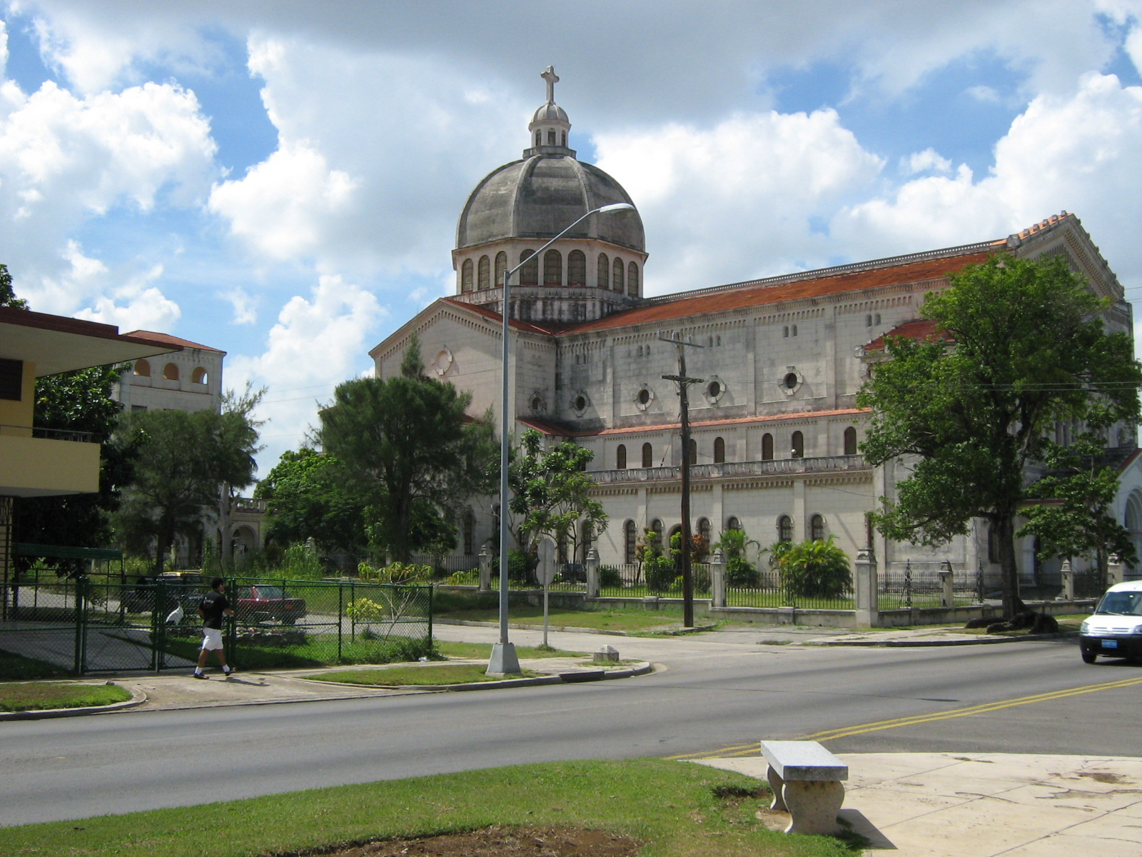 Jesus de Miramar, quinta avenida, La Habana